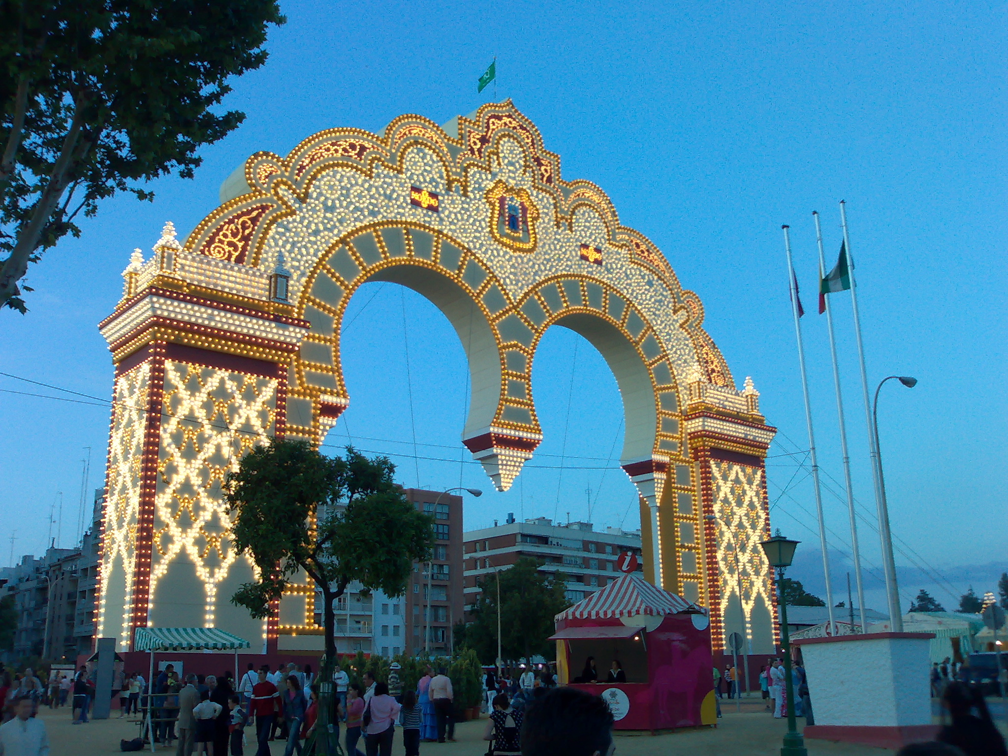 Portada de la Feria de abril de Sevilla del año 2007.